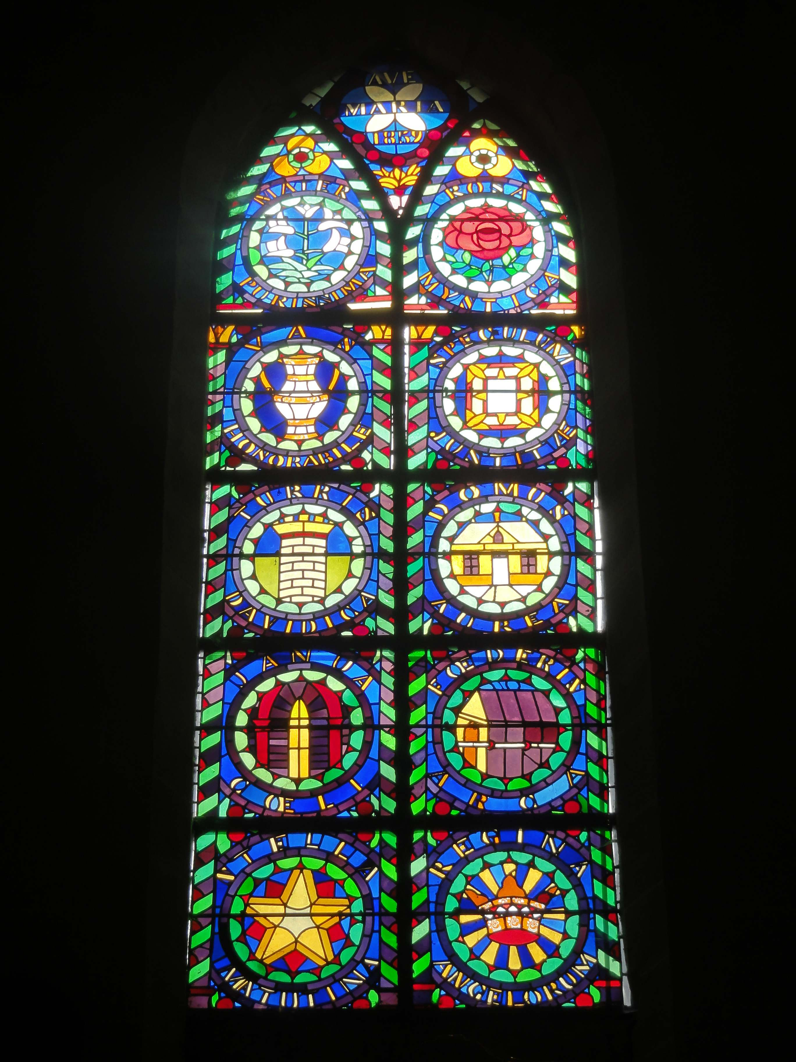 Verrière n° 5 (à l'est du croisillon nord), Ave Maria - Litanies de la Vierge, réalisée en 1859 par l'abbé Théodore-Cyrille Deligny (Francières 1808 - Compiègne 1887), curé de Jonquières de 1834 à 1861. Représentation, du haut vers le bas et de gauche à droite : Mère très pure, rose du mystère, vase admirable, miroir de justice, tour de David, maison d'or, porte du Ciel, arche d'Alliance, étoile du matin, reine des Anges.